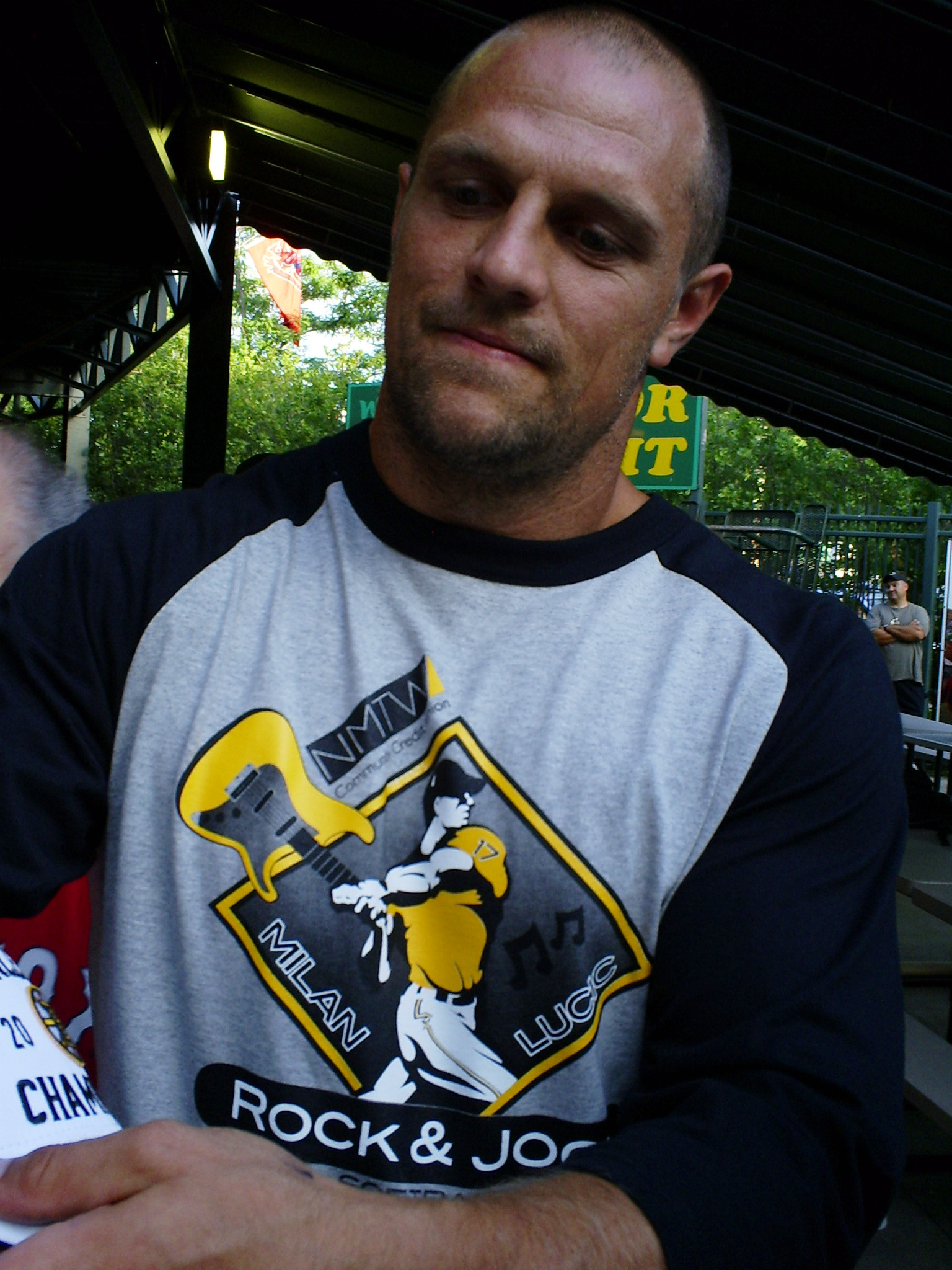 Dennis Seidenberg